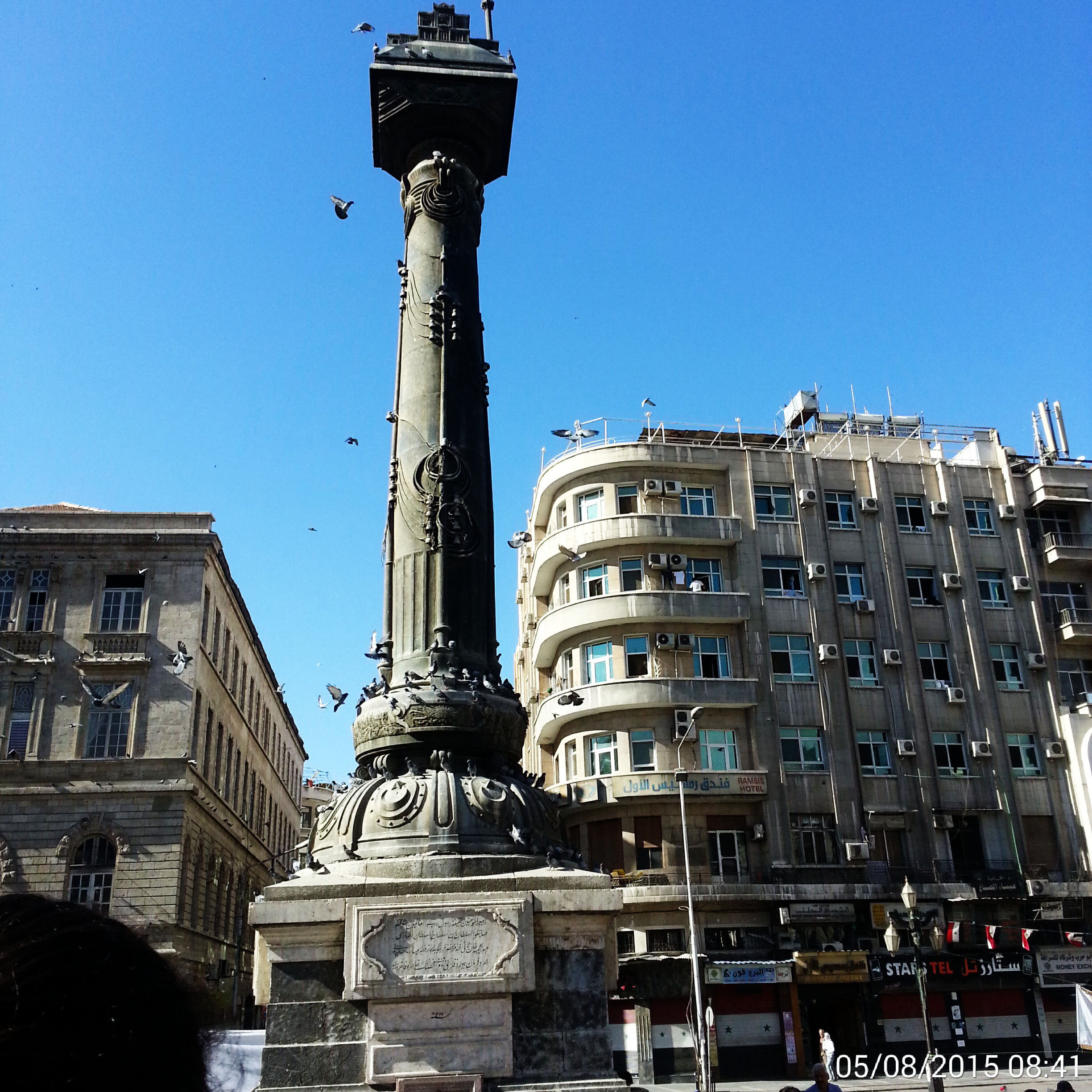 نقش عليه باللغة التركية العثمانية :"أمير المؤمنين خليفة رسول رب العالمين شوكتلو مهاتبلو السلطان ابن السلطان السلطان الغازي عبد الحميد خان ثاني افند مزحضر نلرنيك حجاز خطة مباركة سنة تمديد امر وفرمان بيور دفلري تلغراف خطنك خاطرة فاخره سيد" والذي معناه بشكل عام باللغة